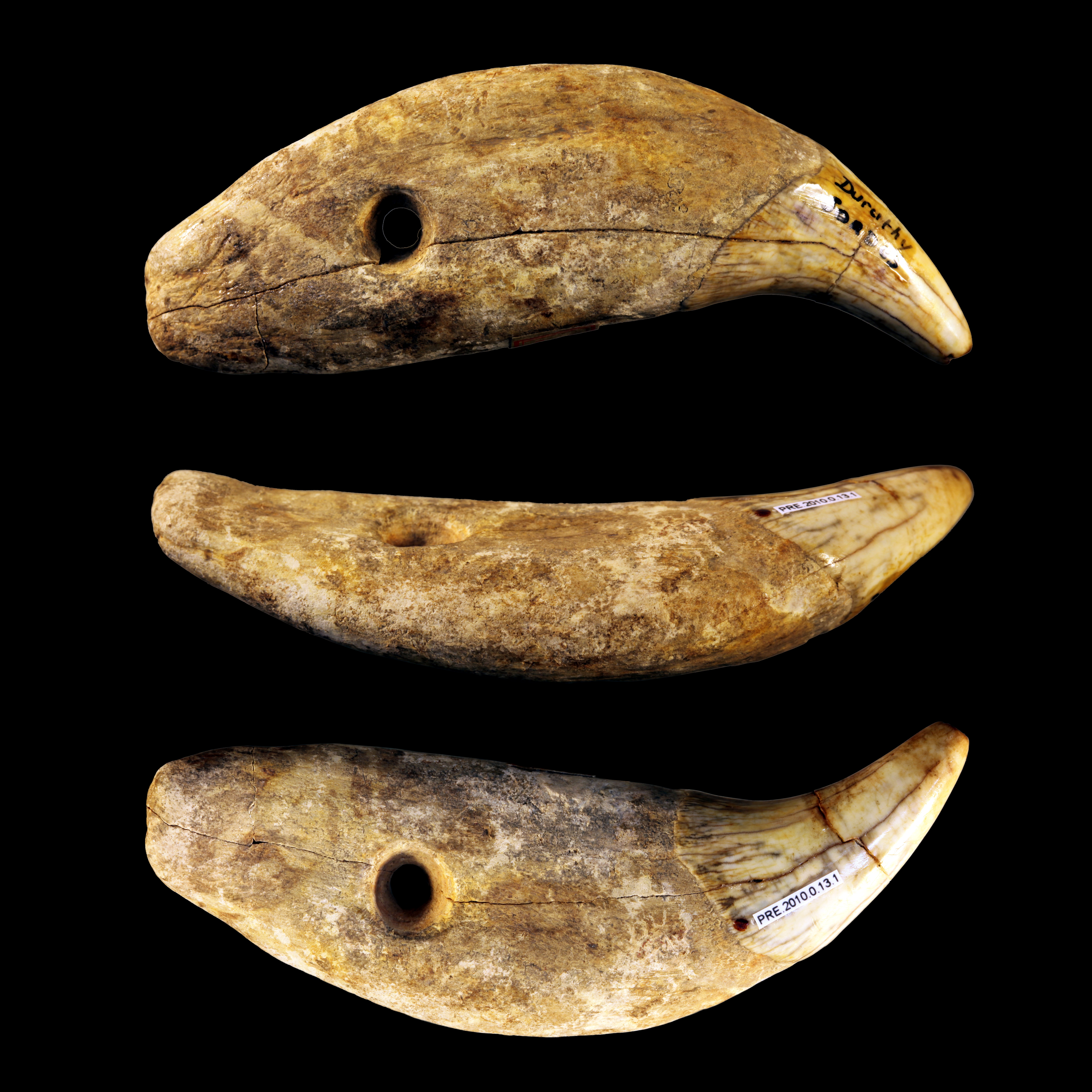 Durchlochte Raubtierzähne aus der Duruthy-Höhle bei Sorde-l'Abbaye, Département Landes. Grabungen durch L. Lartet und G. Chaplain Duparc, 1873–1874. Heute Inv. PRE.2010.0.13.1, Musée d'Histoire naturelle, Toulouse.